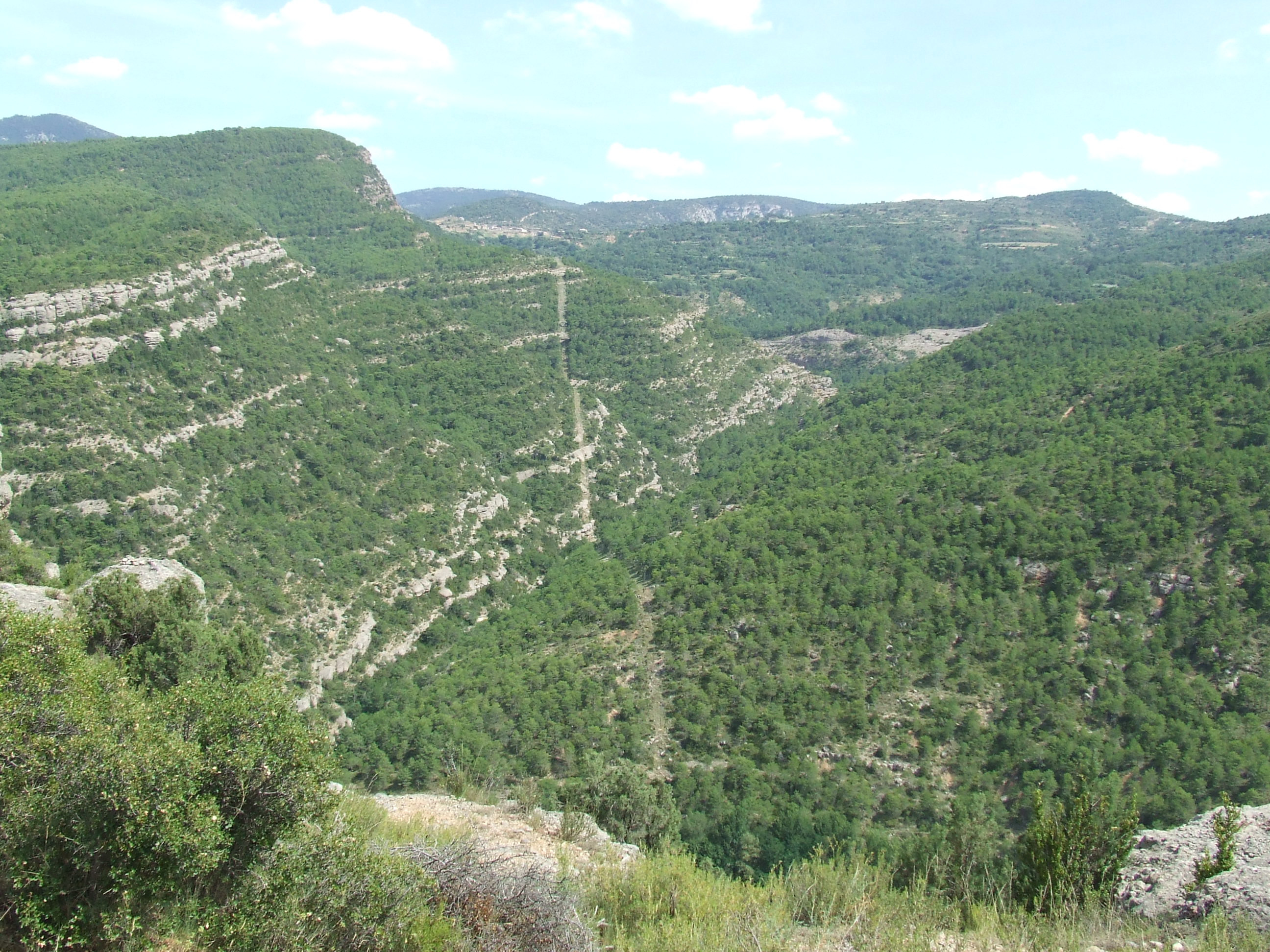 El Barranc de la Molina (Hortoneda de la Conca, Conca de Dalt, Pallars Jussà)